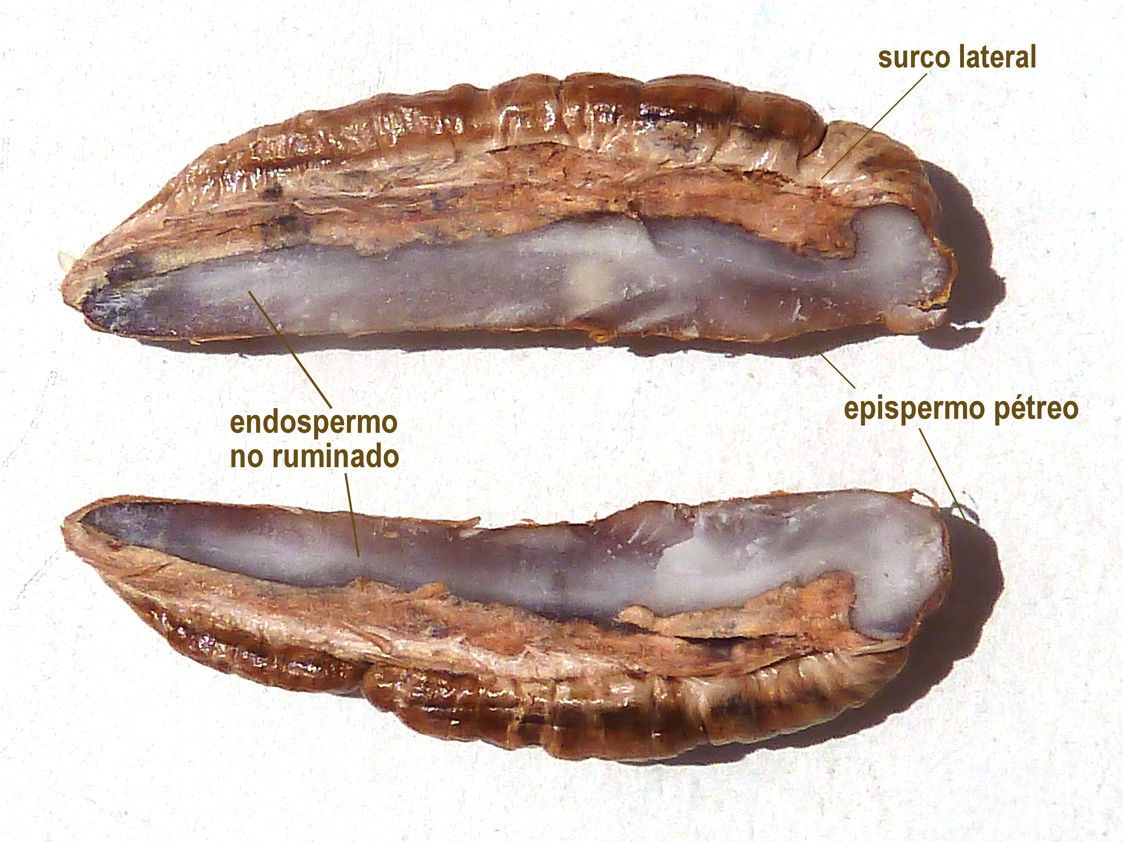 Phoenix dactylifera ( palma) - Semilla: corte longitudinal - La Huerta, Albatera (Provincia de Alicante, España).